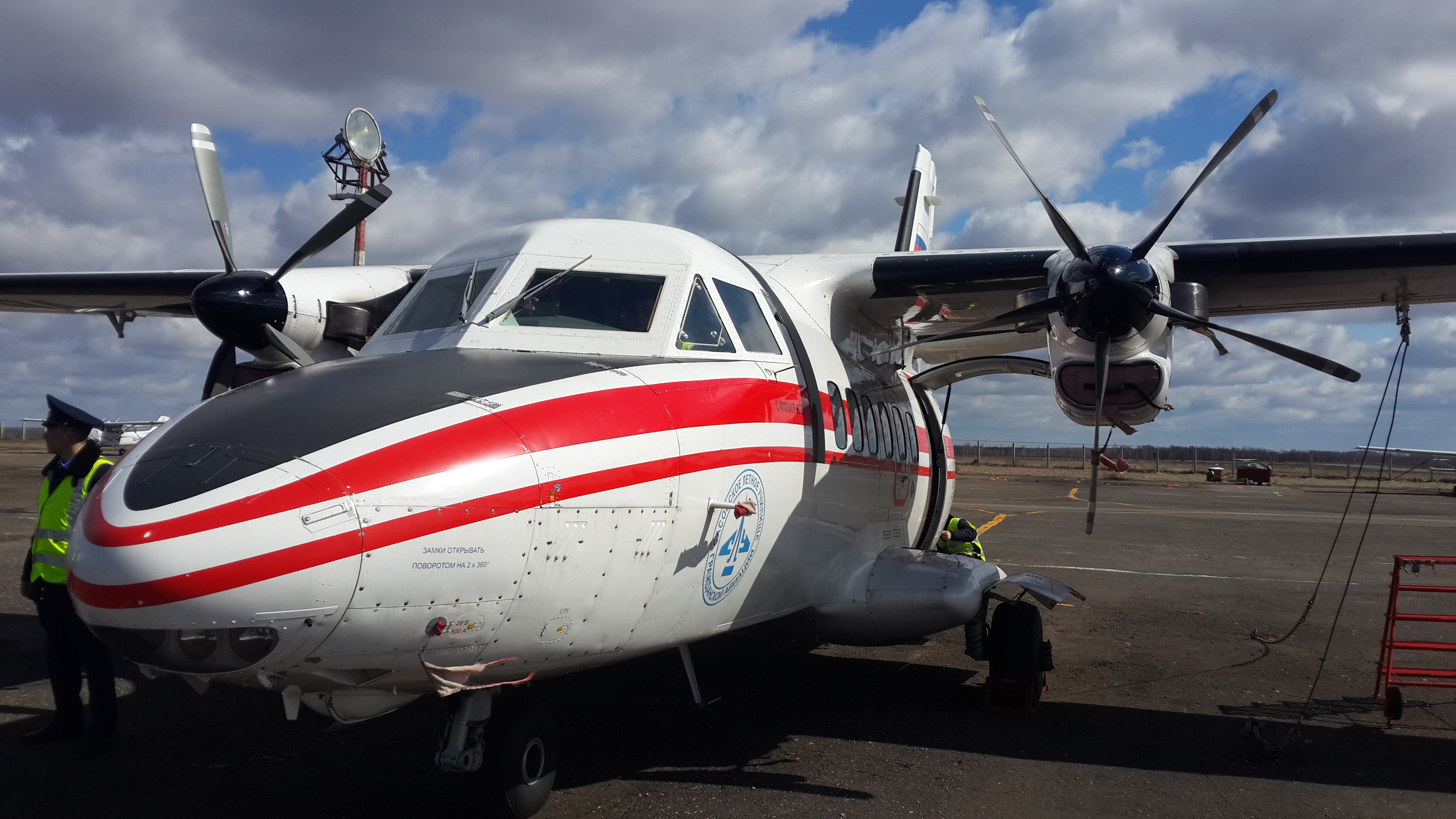 ВС Сасовского ЛУ ГА Л-410 УВП Э20